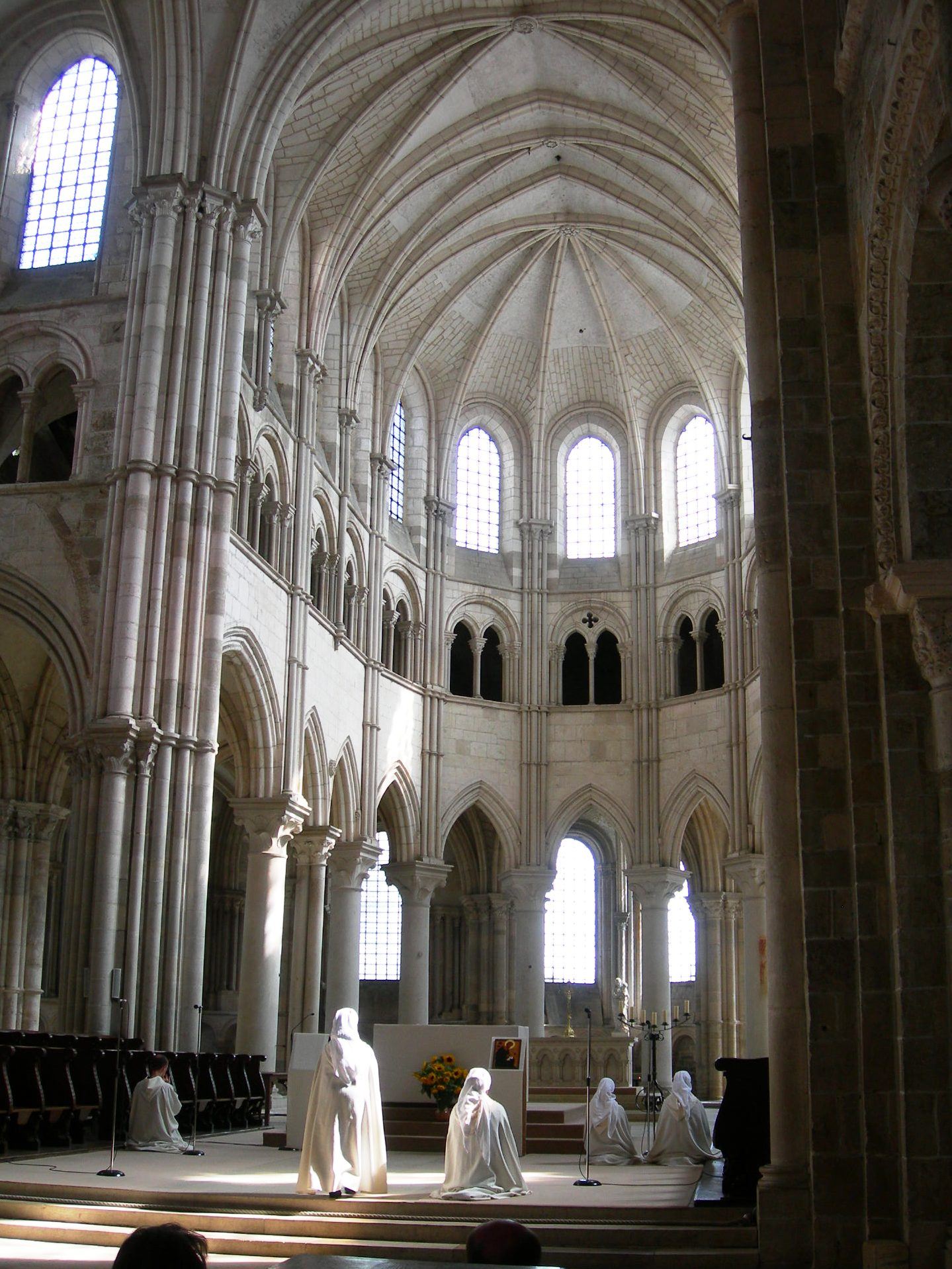 Ste Madeleine choir interior.)